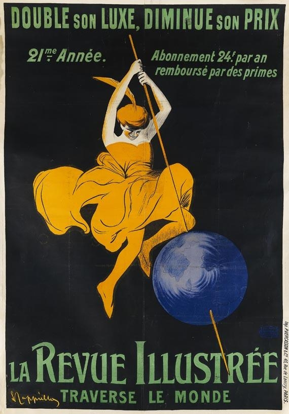 La "Revue illustrée" traverse le monde, affiche de Leonetto Cappiello (1906).